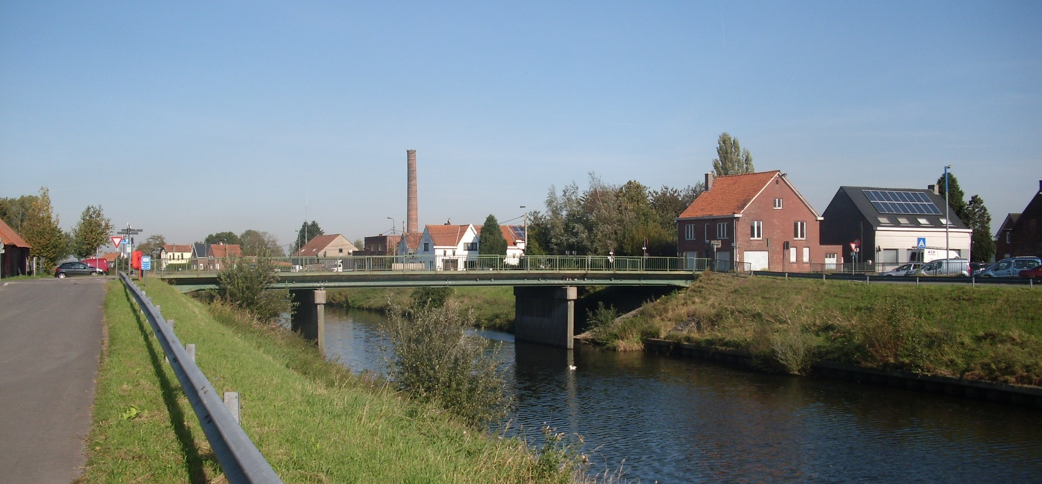 Motjesbrug over het Schipdonkkanaal - verbind het Motje met de Grote Steenweg - Zomergem - Oost-Vlaanderen - België